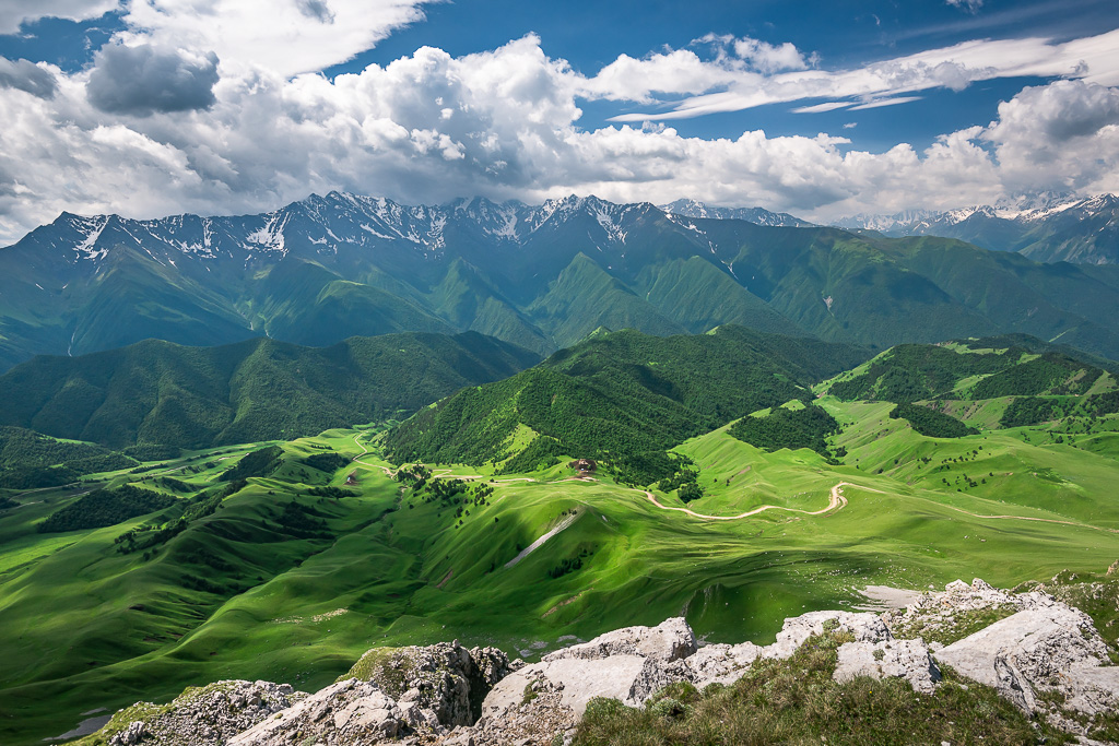 Вид на Кавказские горы (хребет), Ингушетия